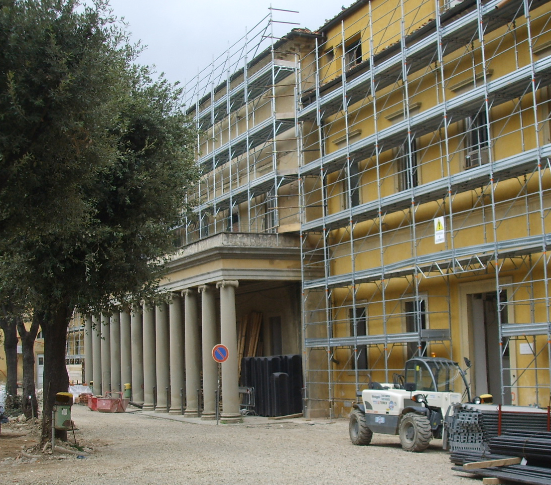 Palazzina de' Servi (restauro in corso, aprile 2008)